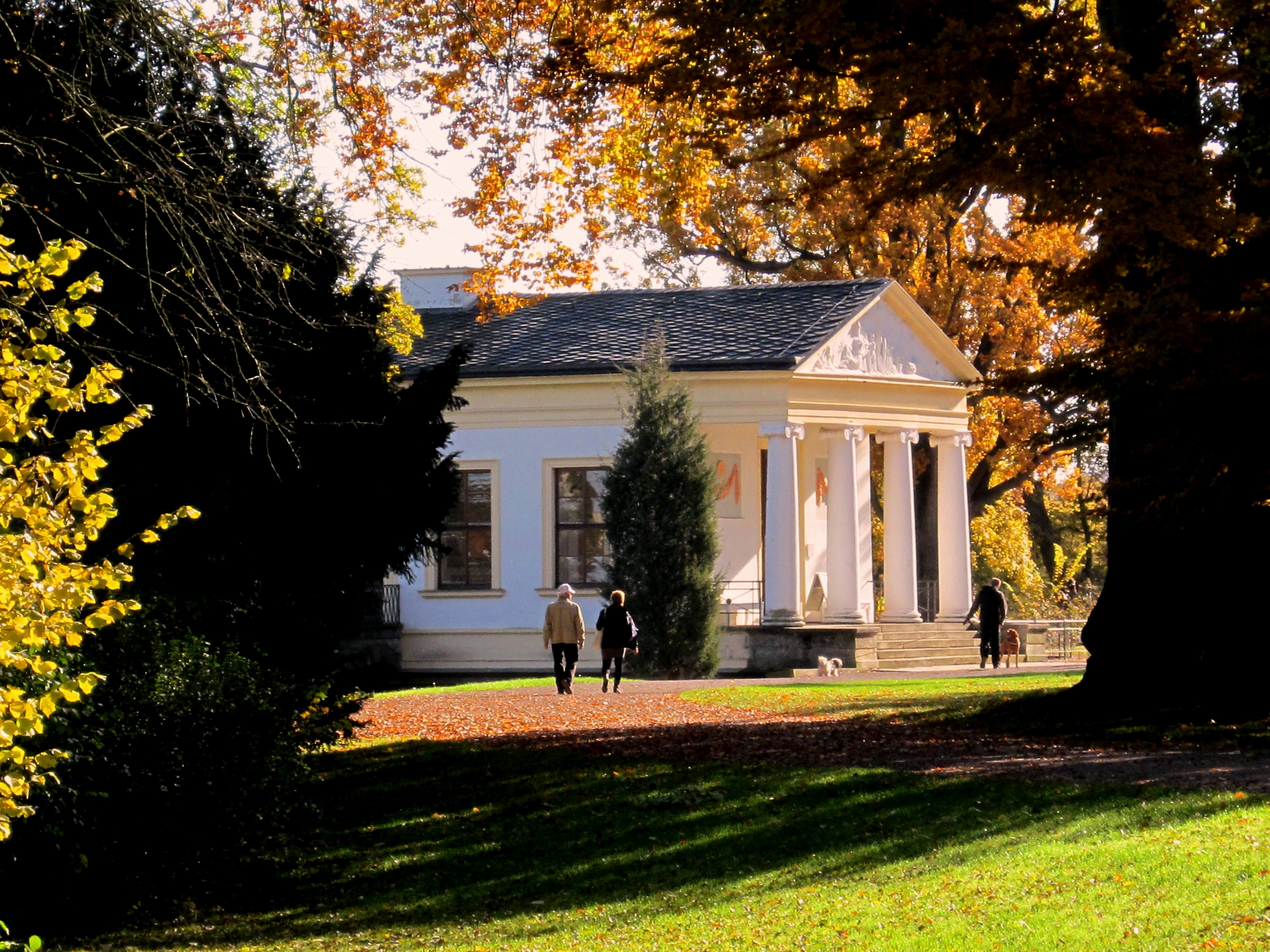 am s-w Uferhang der Ilm, Sommerwohnung von Herzog Carl August, 1791-98 unter Goethes Leitung nach Plänen von Johann August Arens im Stil der röm. Antike erbaut